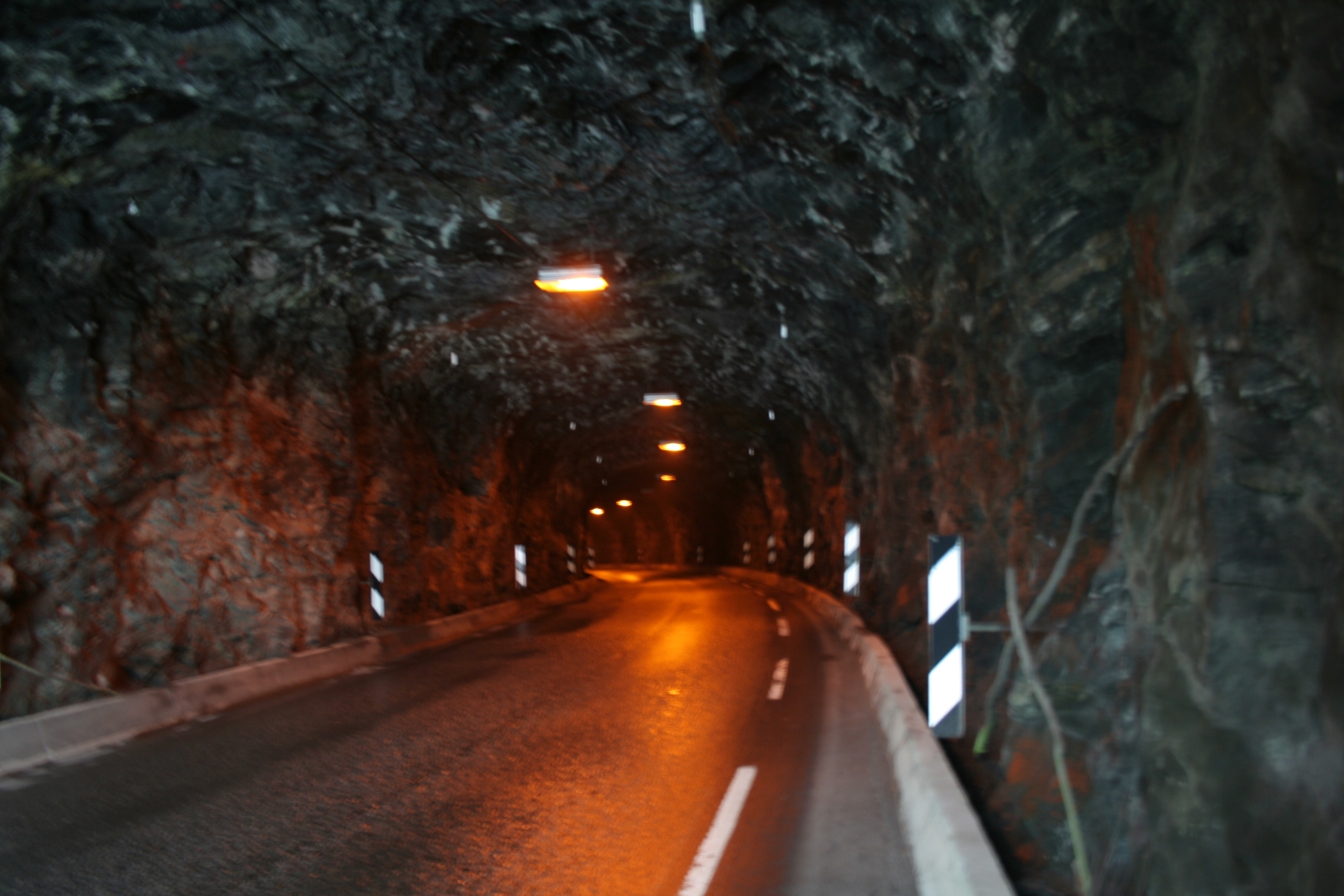 Tiny road tunnel in Norway, Skorvetunnelen. Located in Askvoll.